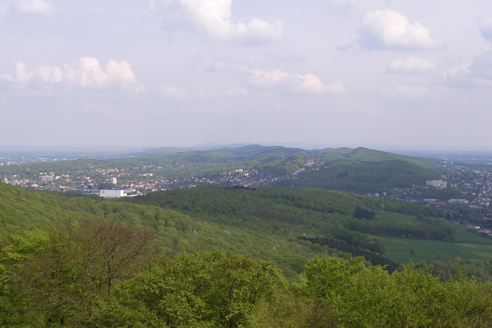 Bielefeld, Deutschland: Blick vom Aussichtsturm Hünenburg auf den Kamm des Teutoburger Waldes in Richtung Südosten.